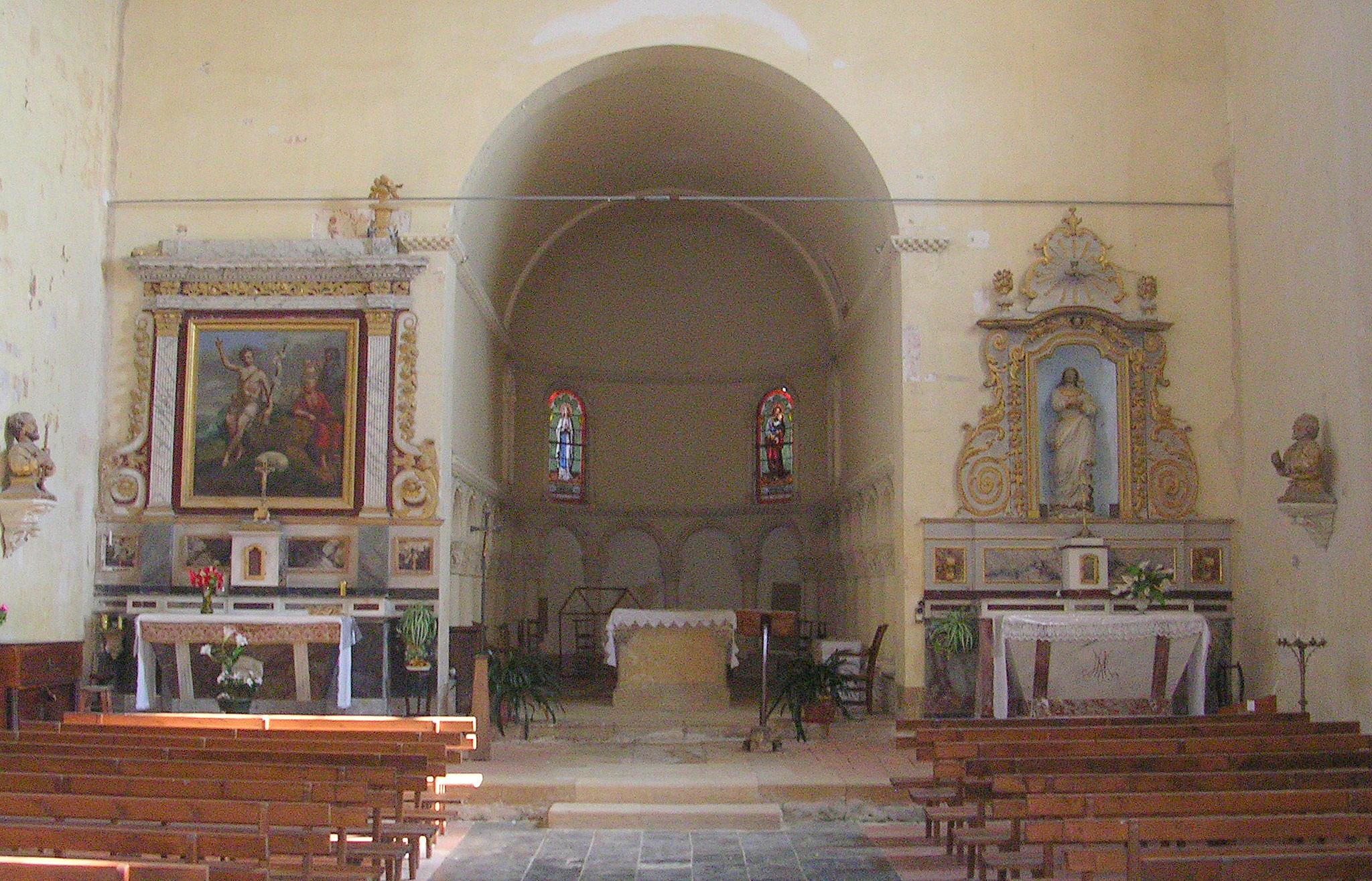 Intérieur de l'église de Tasque (Gers, France)